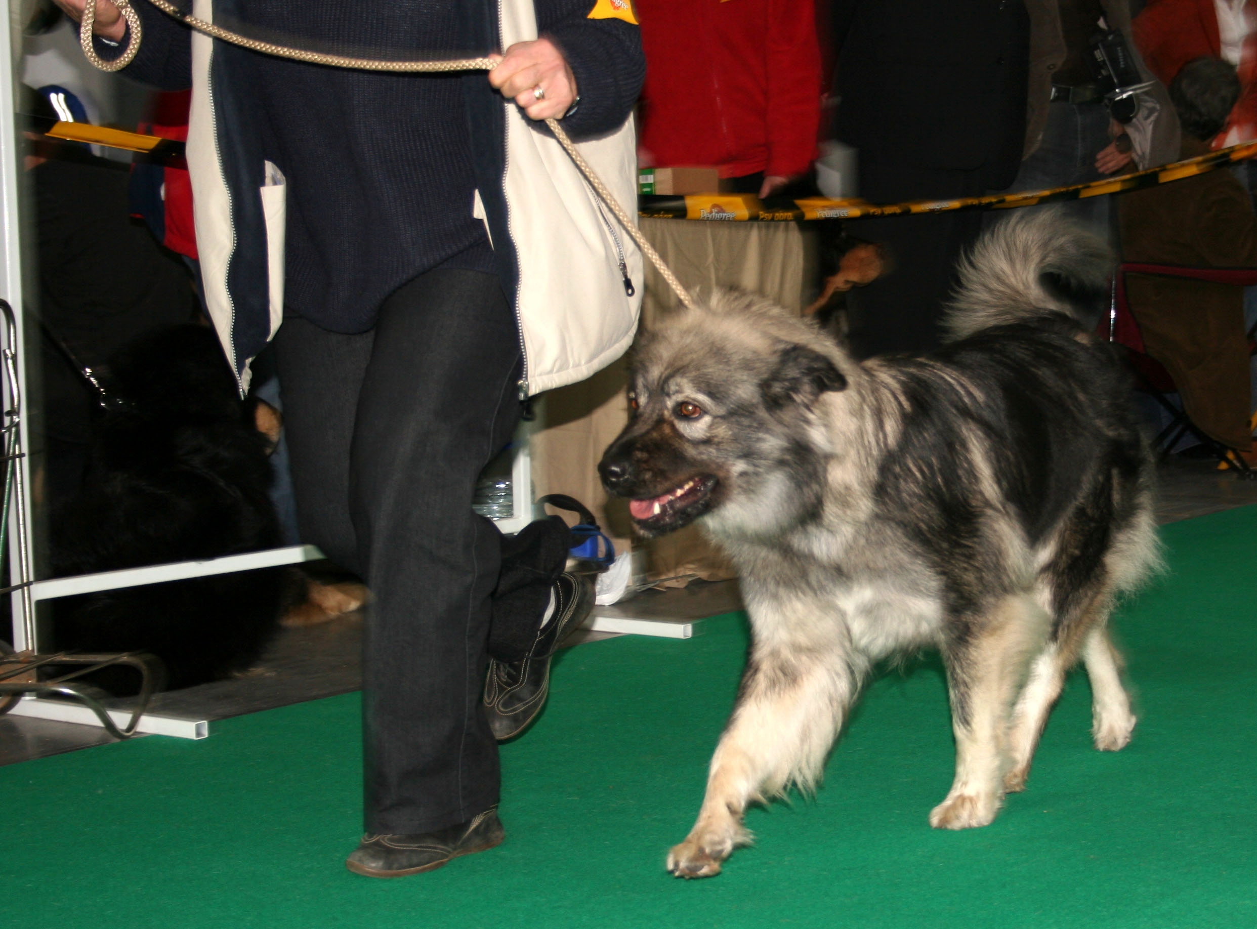 Kraski_owczarek_podczas prezentacji_na_ringu na Światowej Wystawie Psów Rasowych w Poznaniu.